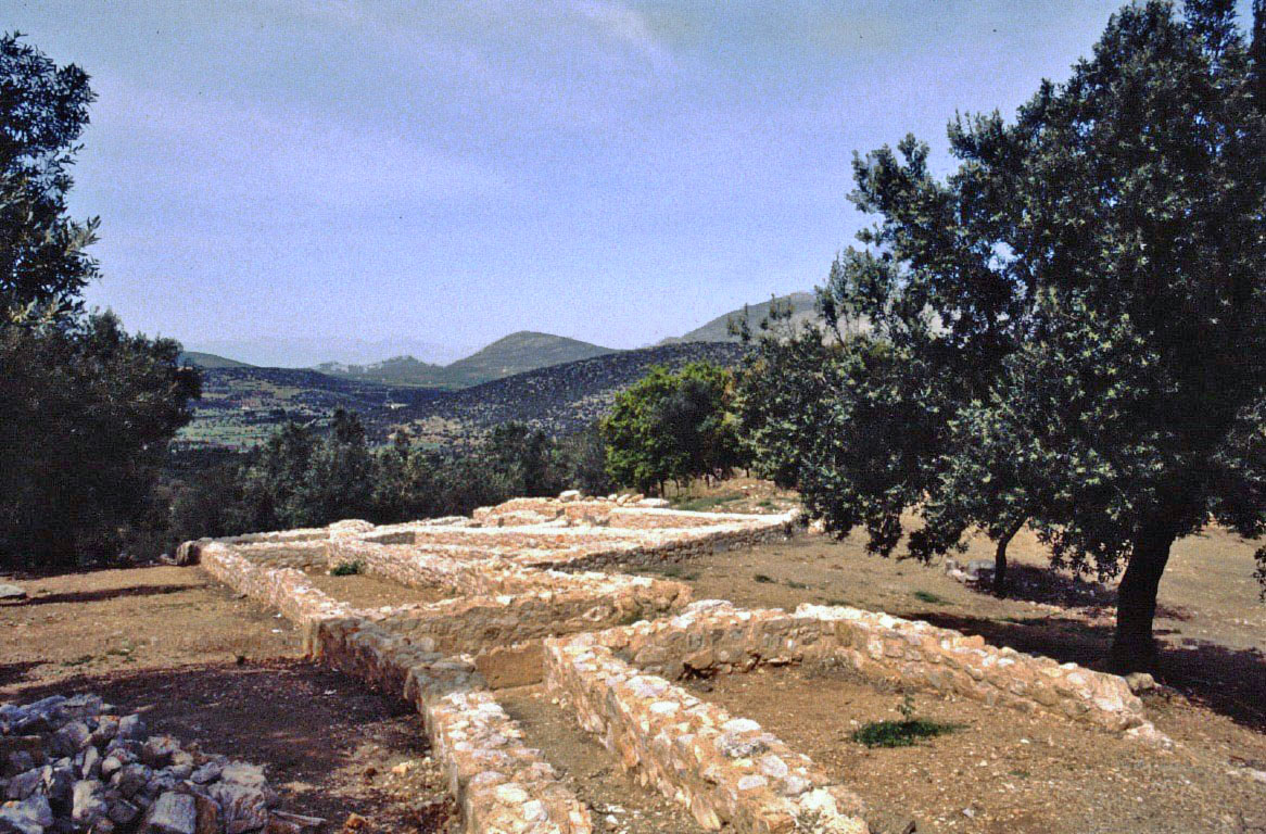 Römisches Bad (2.–4. Jahrh.) etwa 50 m südlich des Heiligtums des Apollon Maleatas